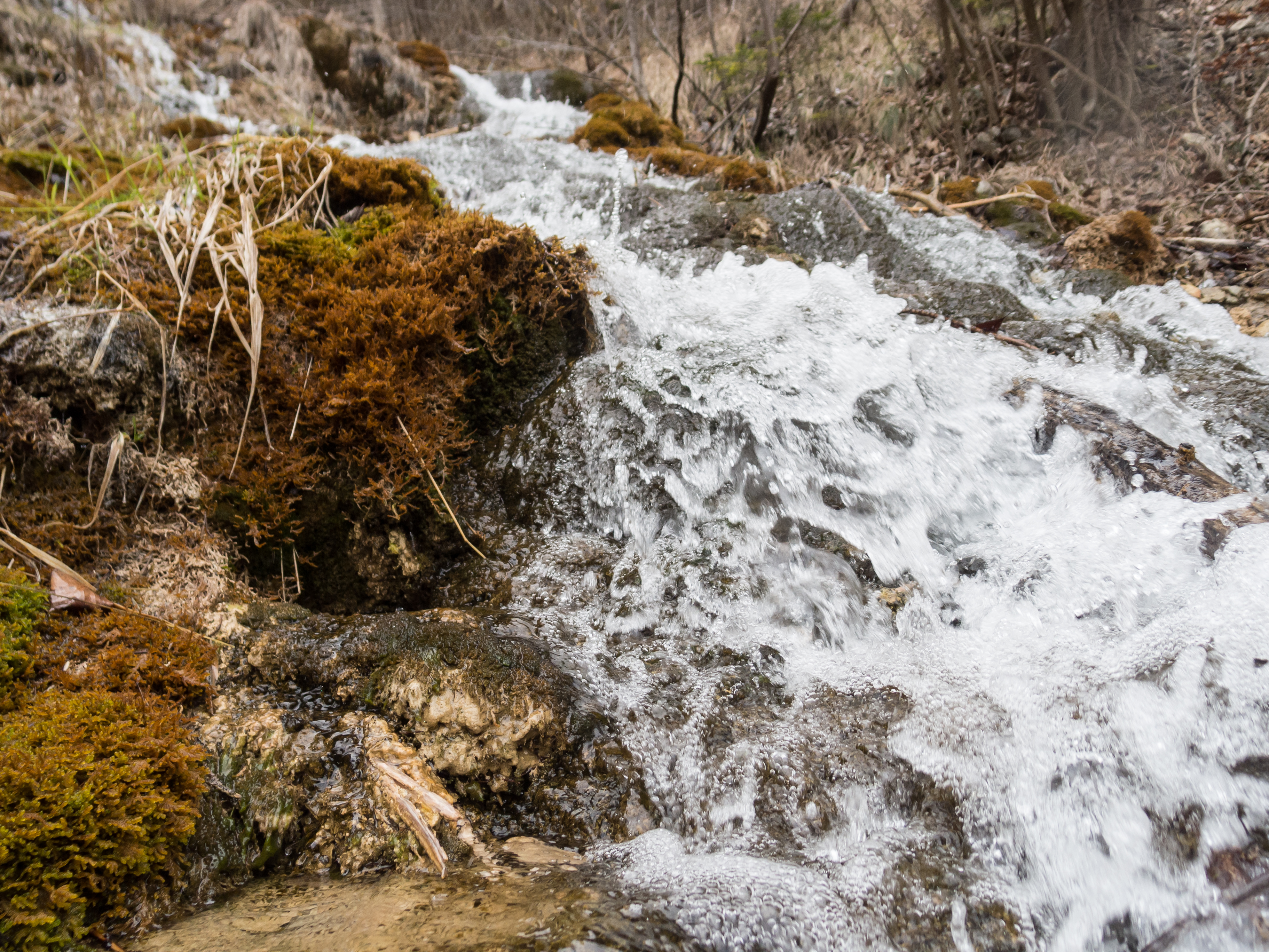 Der Tuffbach beim Innsbrucker Alpenzoo mit Bildung von Kalksinter im Bereich der Moose